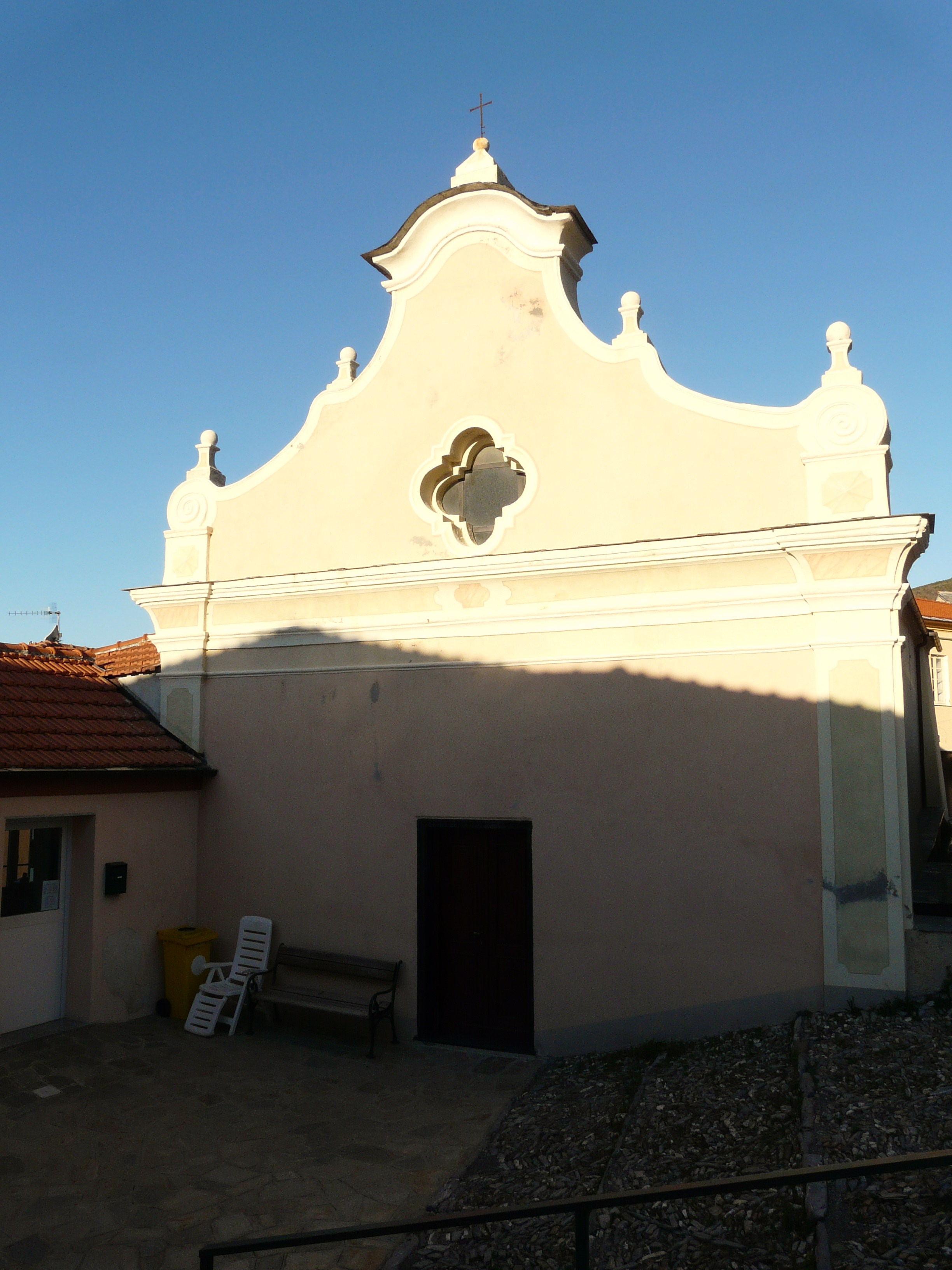 Oratorio di San Bartolomeo, Arnasco, Liguria, Italia